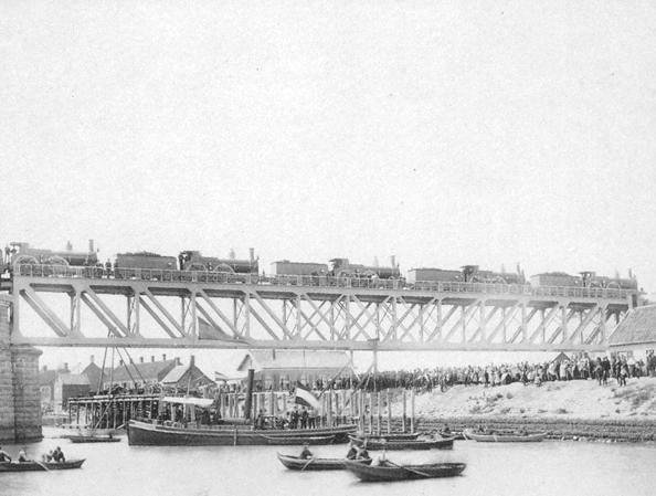 Brug over de Merwede te Sliedrecht (Baanhoek)